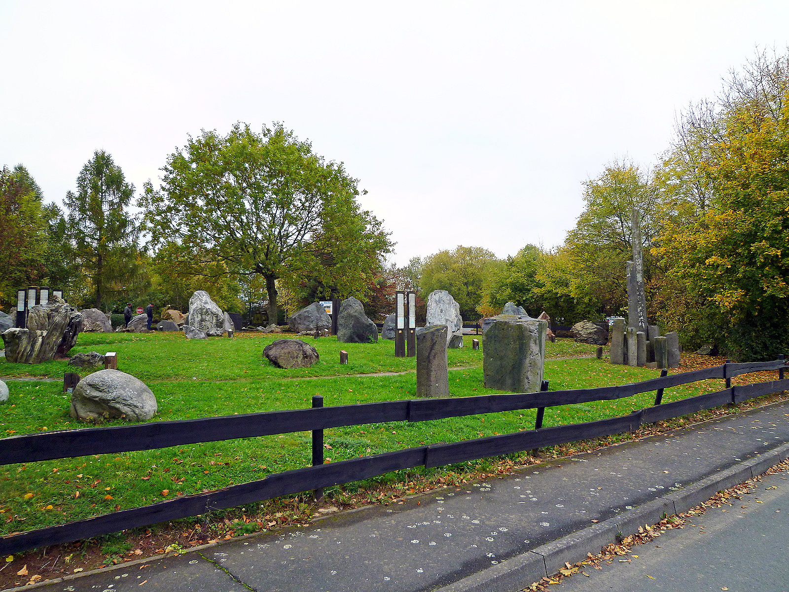 Kubacher Kristallhöhle